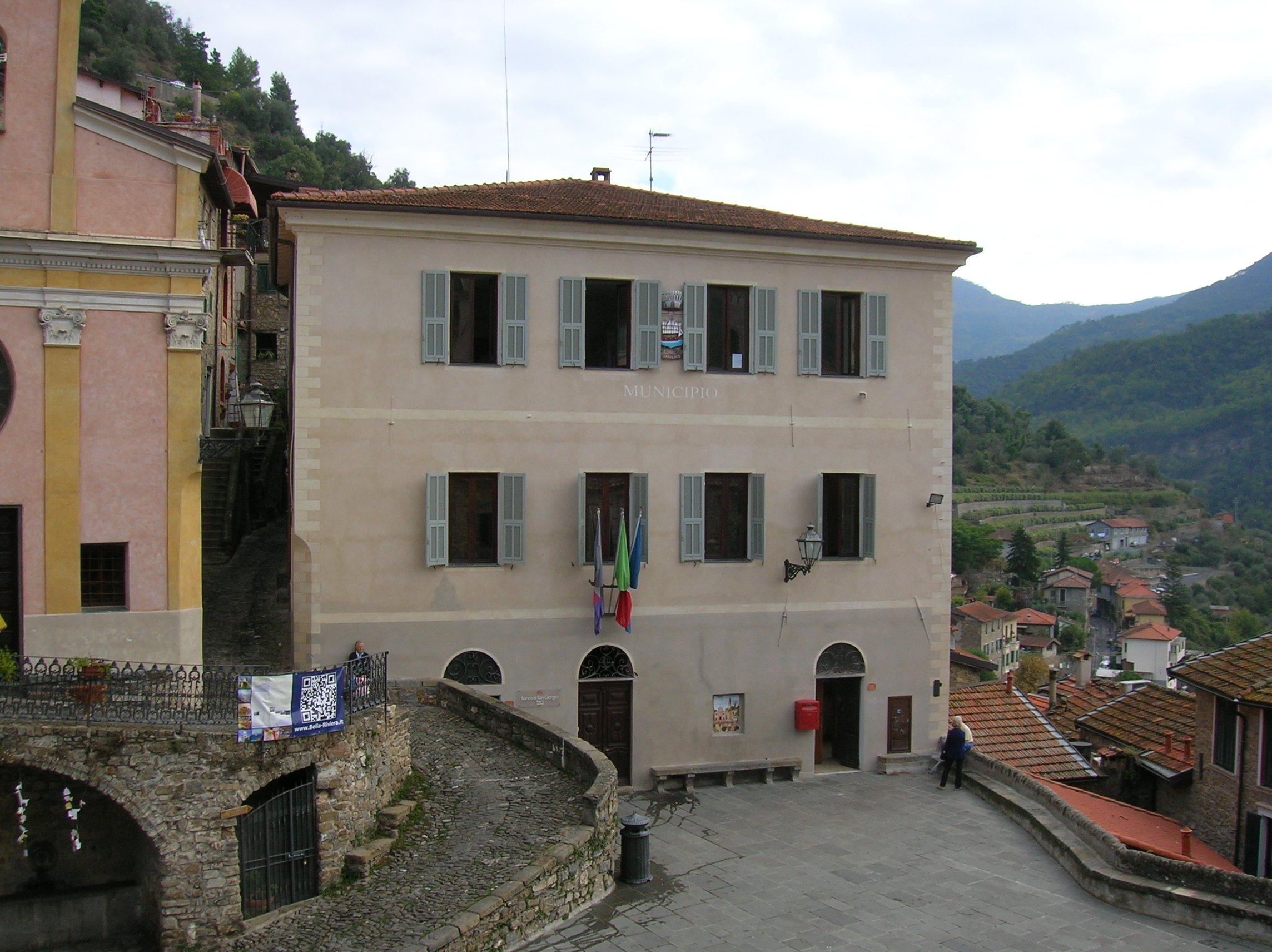 Il municipio di Apricale nel 2013, con facciata reintanacata e senza affreschi. Apricale, Liguria, Italia.